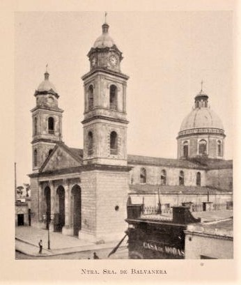 Parroquia Nuestra Senora de Balvanera, Buenos Aires